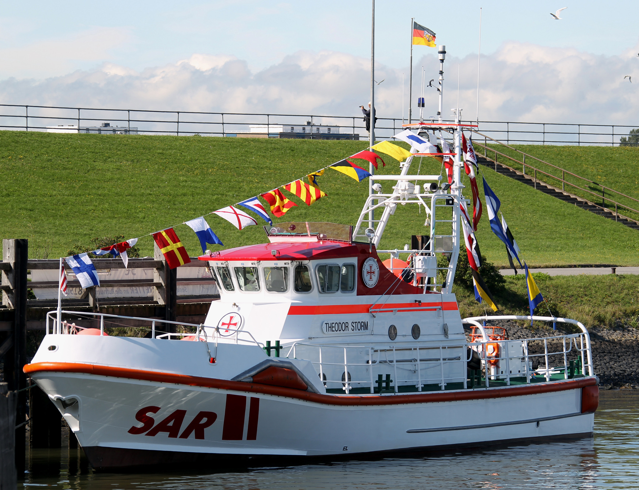 Seenotkreuzer THEODOR STORM kurz nach seiner Taufe in Büsum